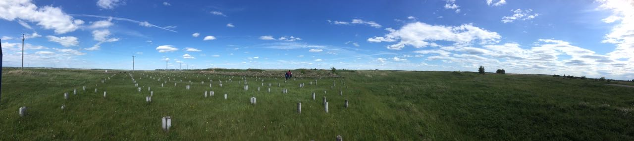 Панорама Билярского городища - справа - мечеть, слева - дом феодала. На фоне - оборонительный земляной вал